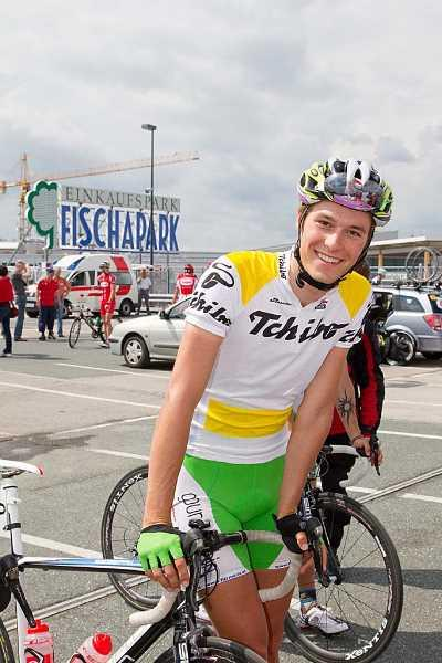 Georg Preidler 2010